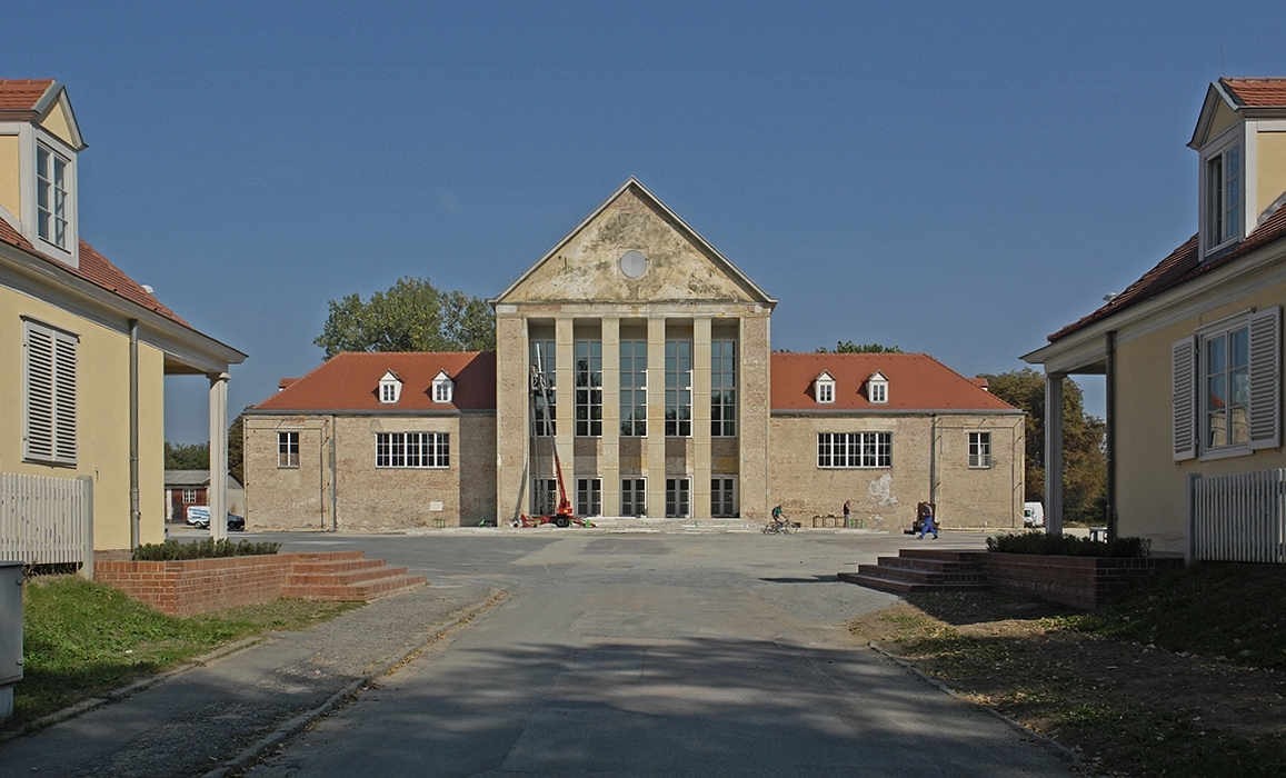 Hellerau, Festspielhaus (September 2006)